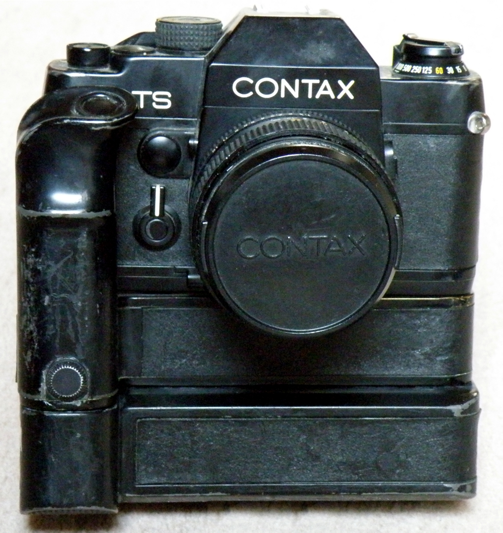 Kamera CONTAX RTS I mit angebautem PMD (Profimotor)